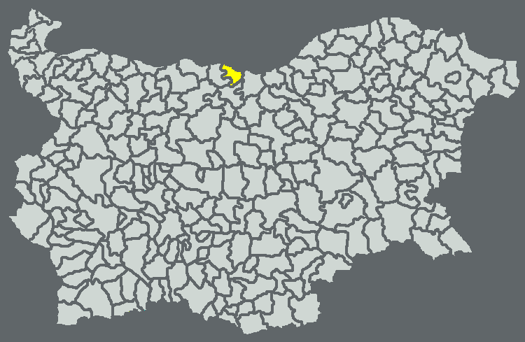 Община Белене на картата на България